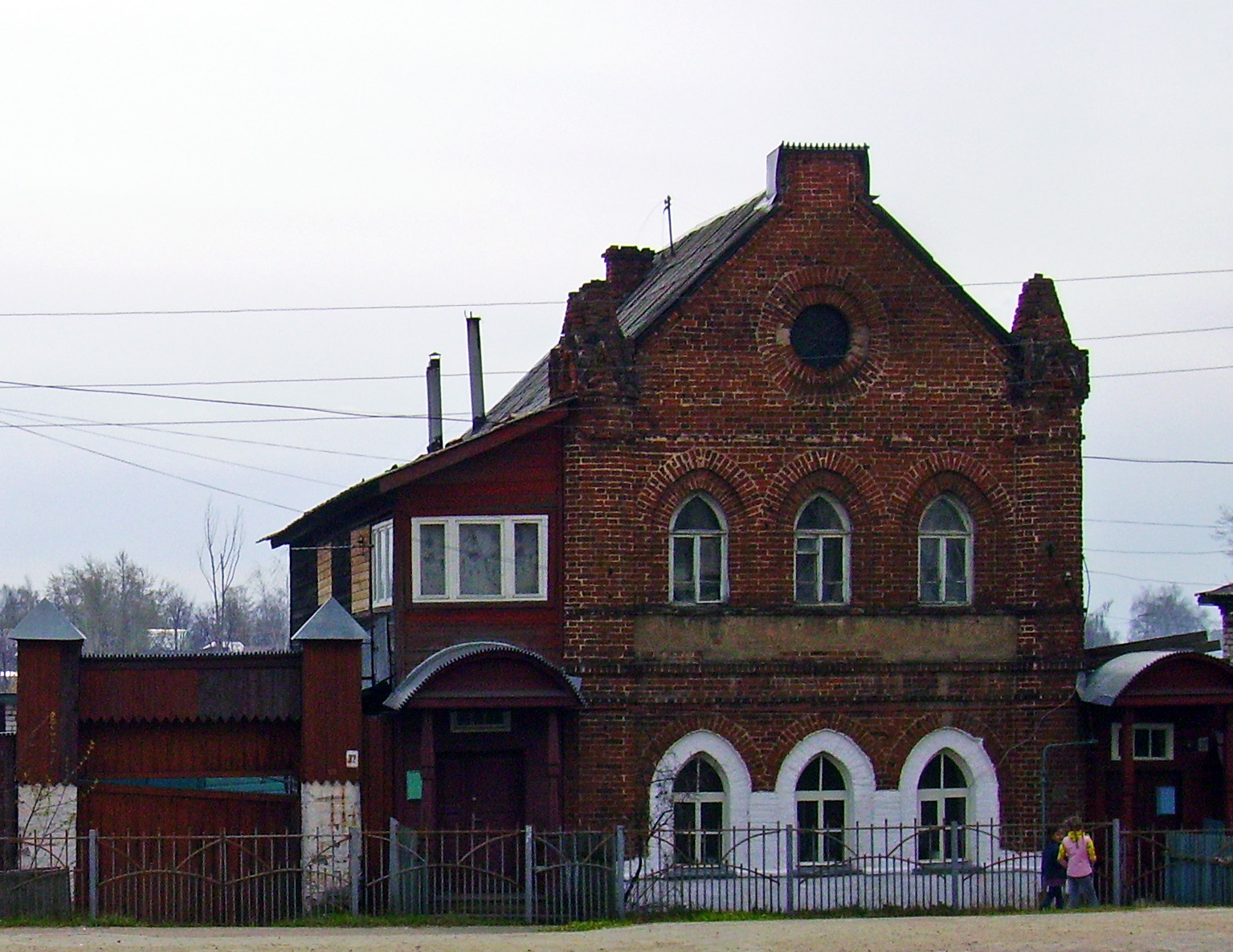 Выкса. Дом рунтов (конец XVIII в.)